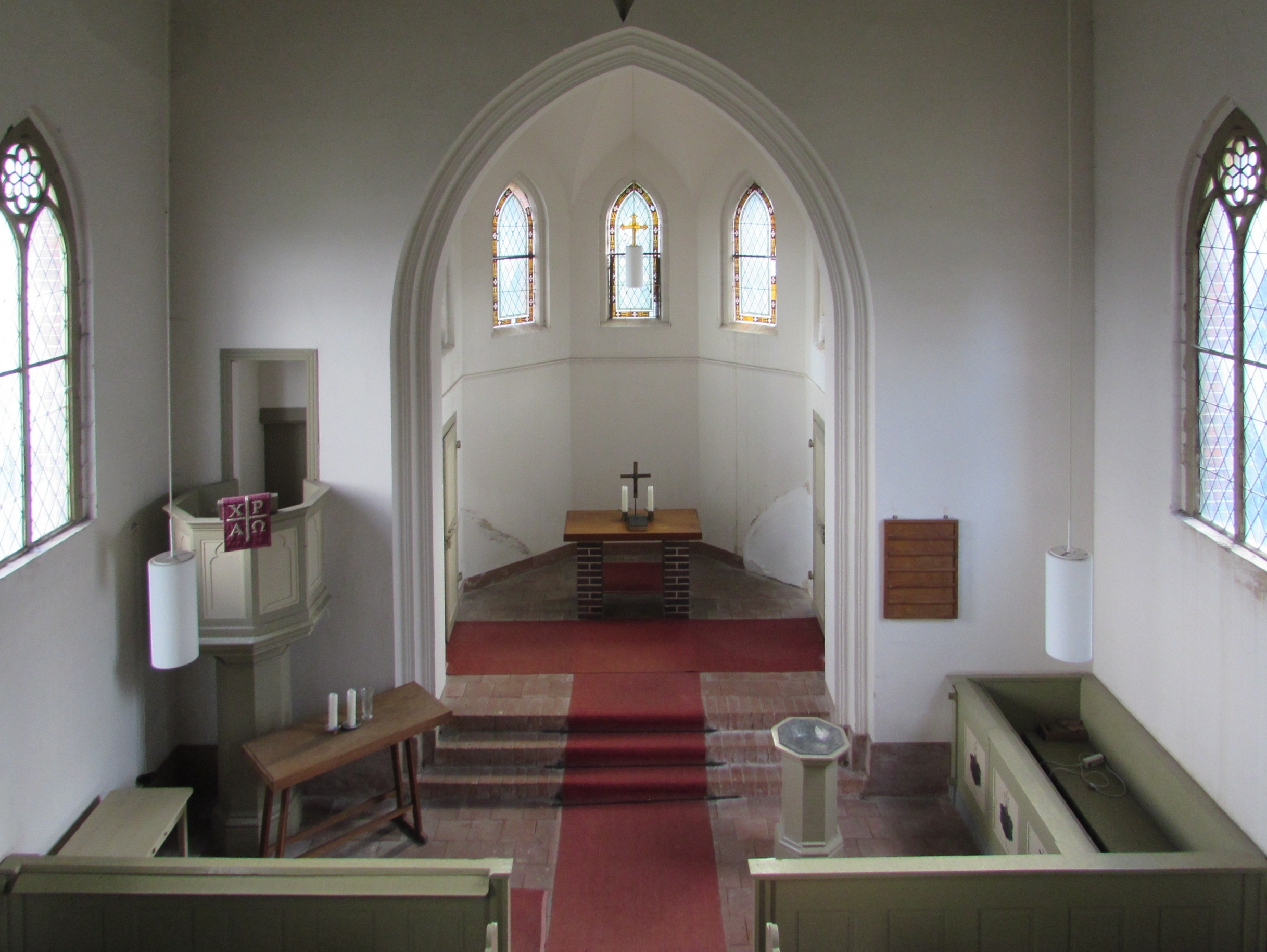 Dorfkirche Vehlen, Innenraum